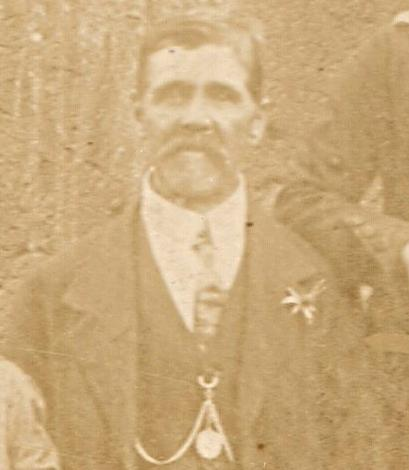 Juan Saavedra, último alcalde de Gualleco